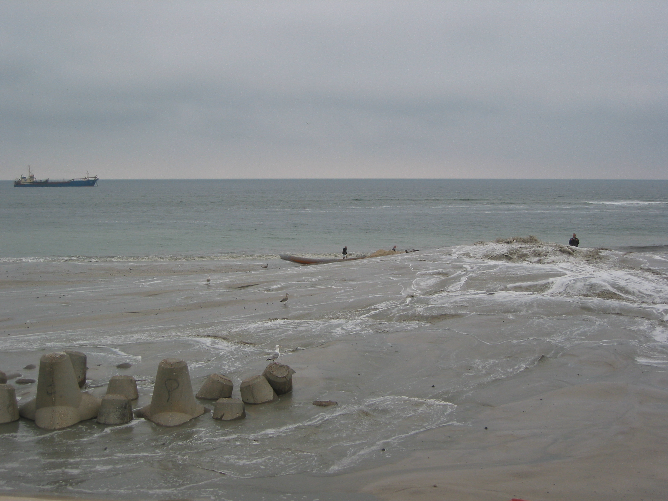 Sand flushing (Westerland)